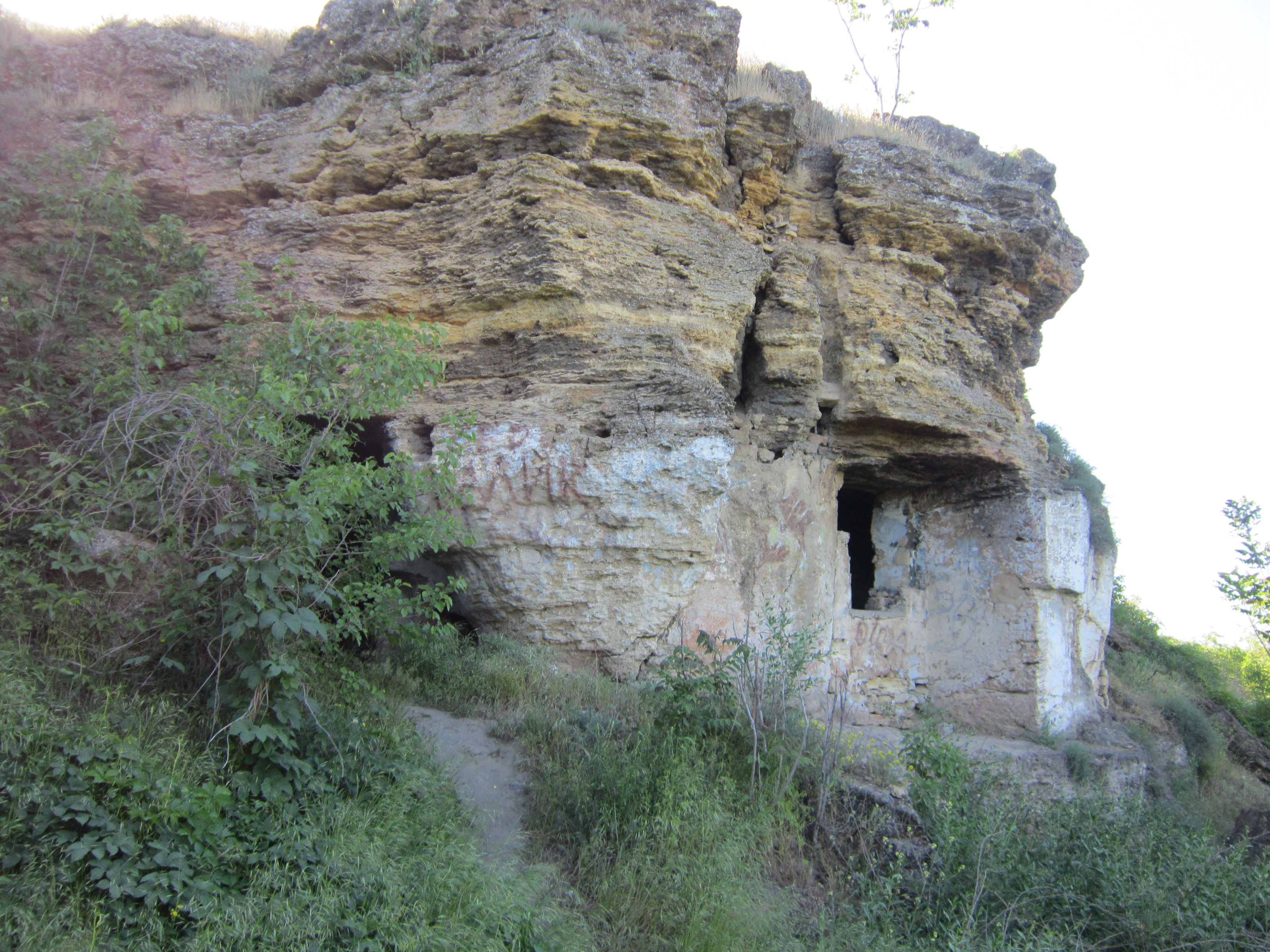 Одеські катакомби, м. Одеса, вул. Картамишівська, 27/29